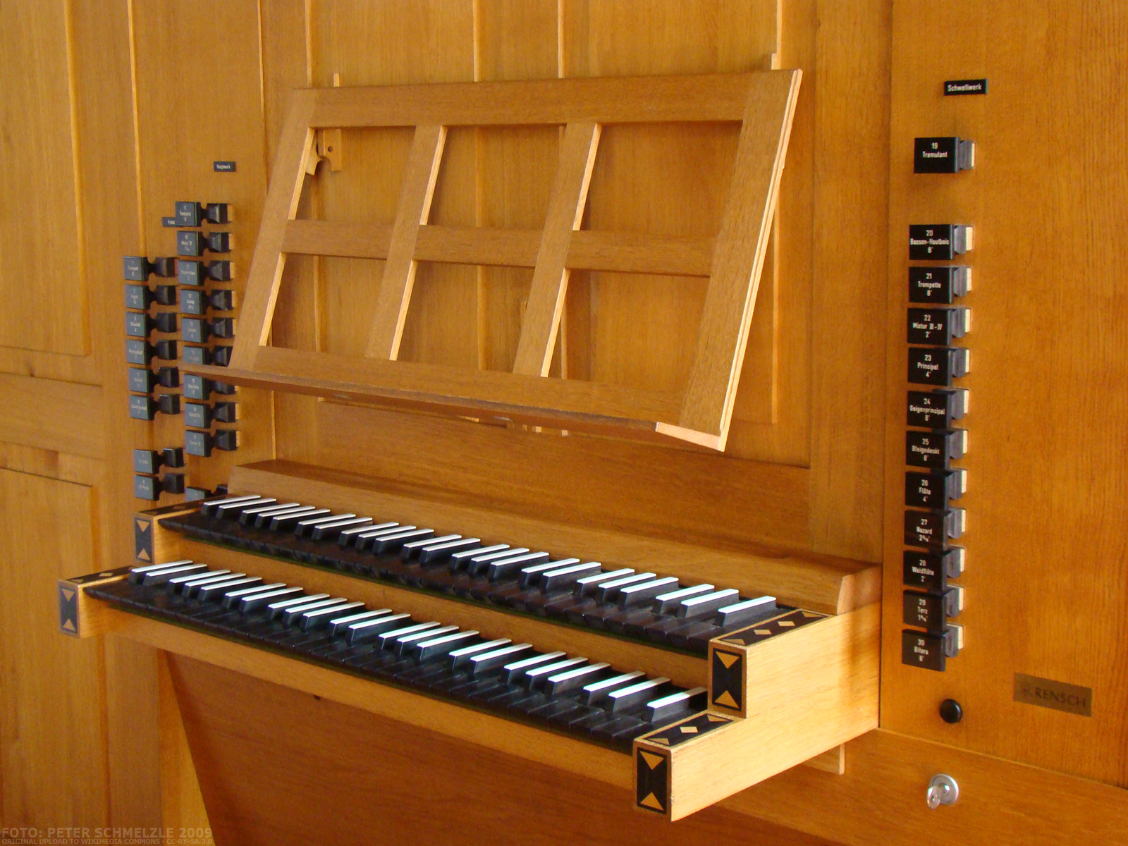 Klaviatur der Rensch-Orgel in der Nordheimer Bartholomäuskirche